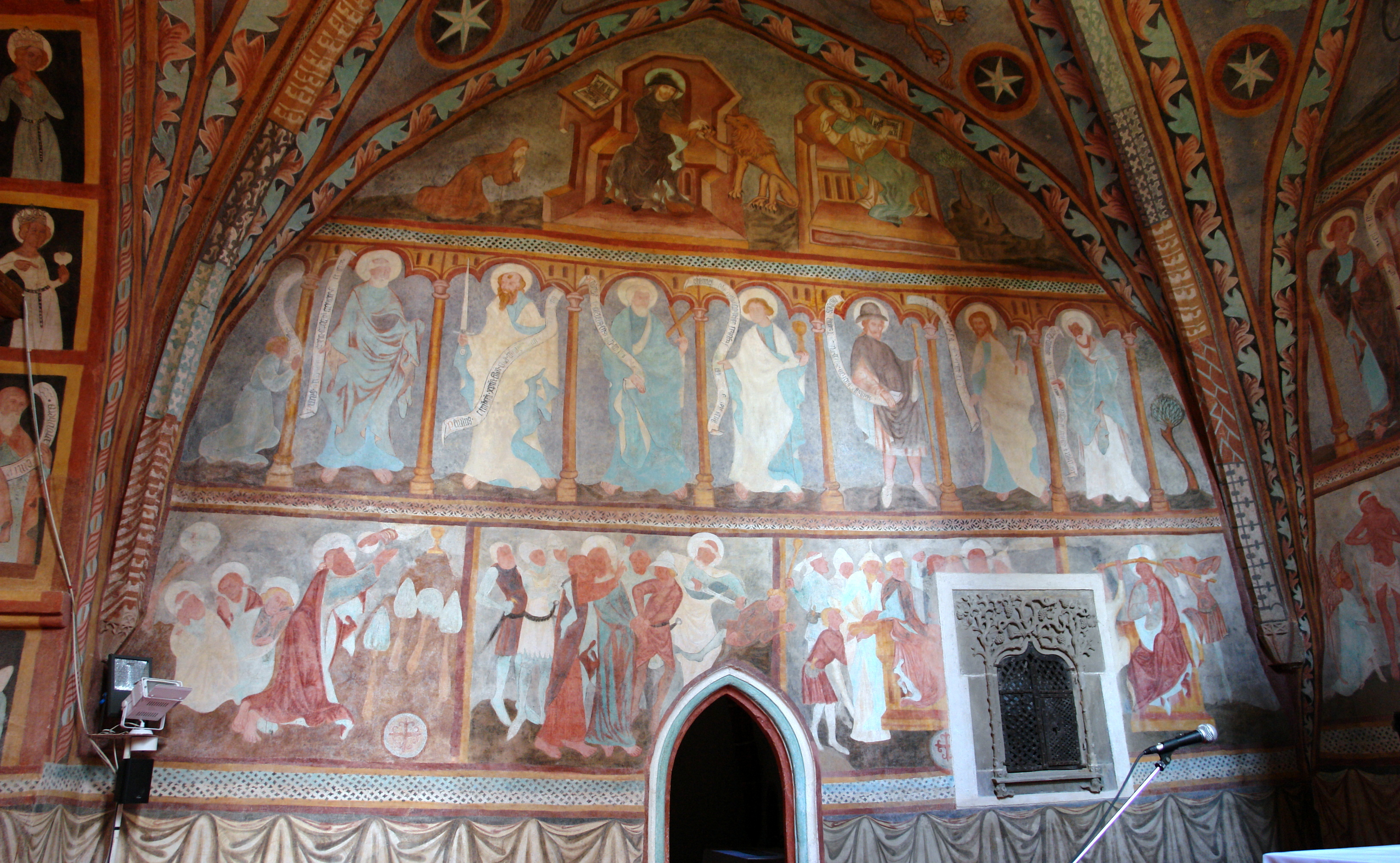 Ferences Kolostor